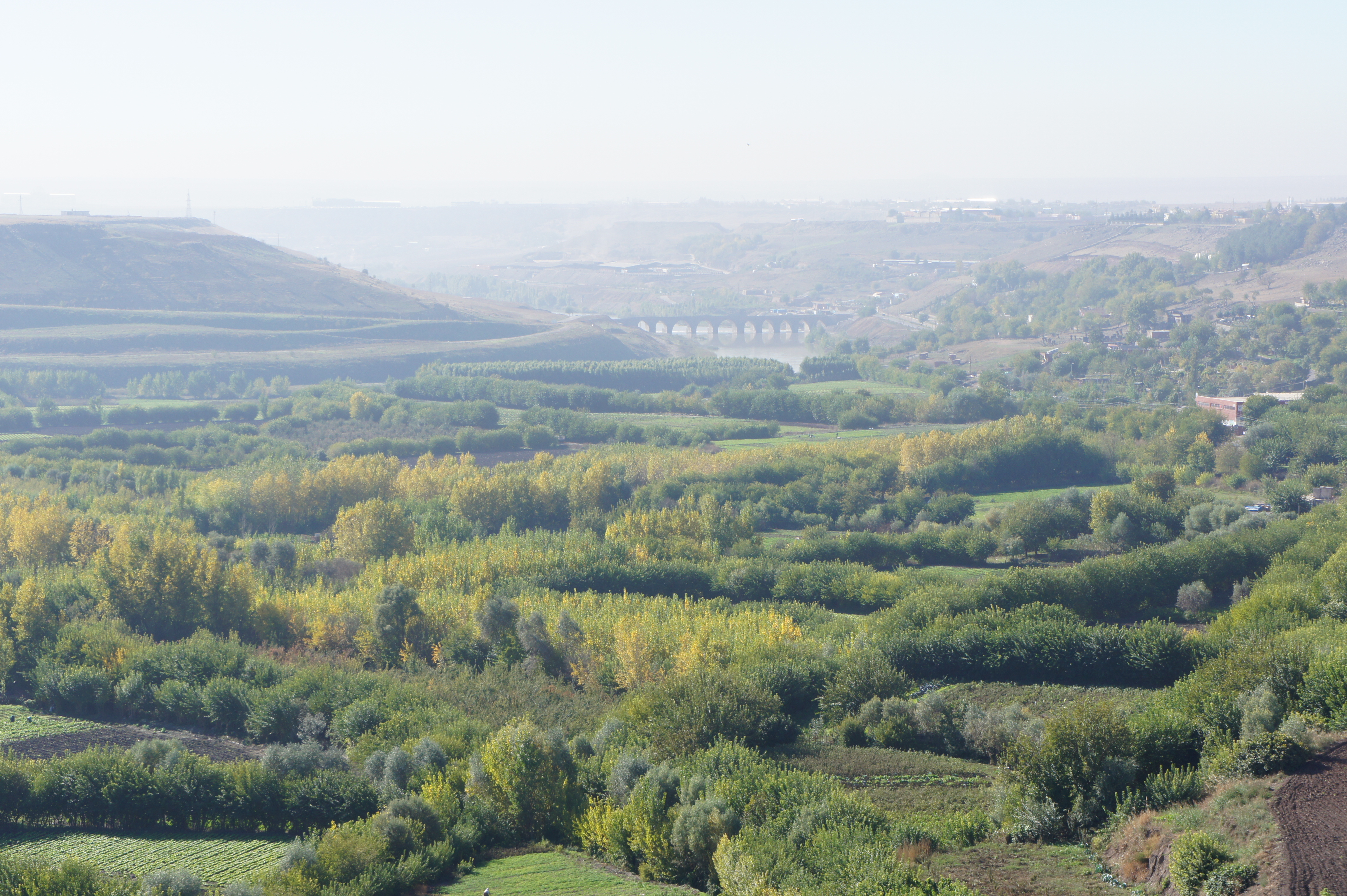 Kurdî: Baxçeyên Hewselê, Amed, 2010.